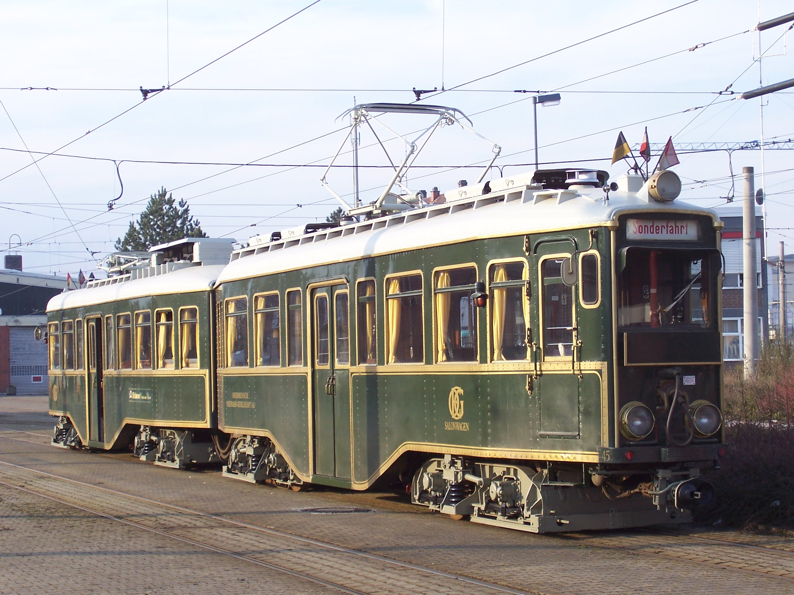 OEG Halbzug 45/46 in Mannheim-Käfertal.